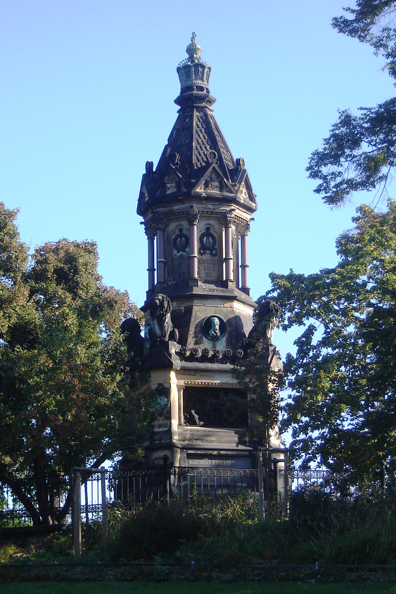 Magdeburg, Kriegerdenkmal